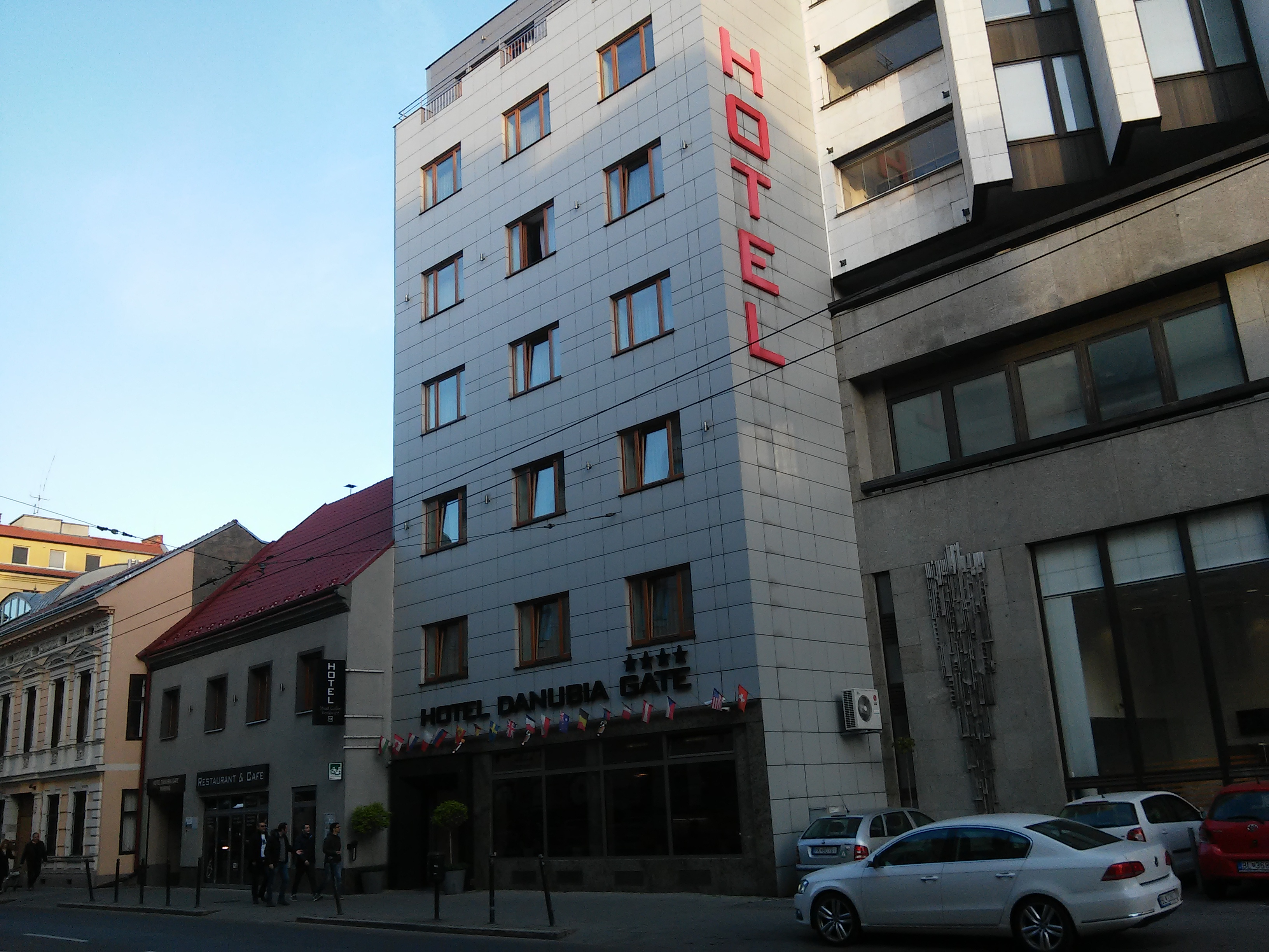 Danubia Gate Hotel, Bratislava